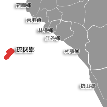 屏東縣琉球鄉相對位置。